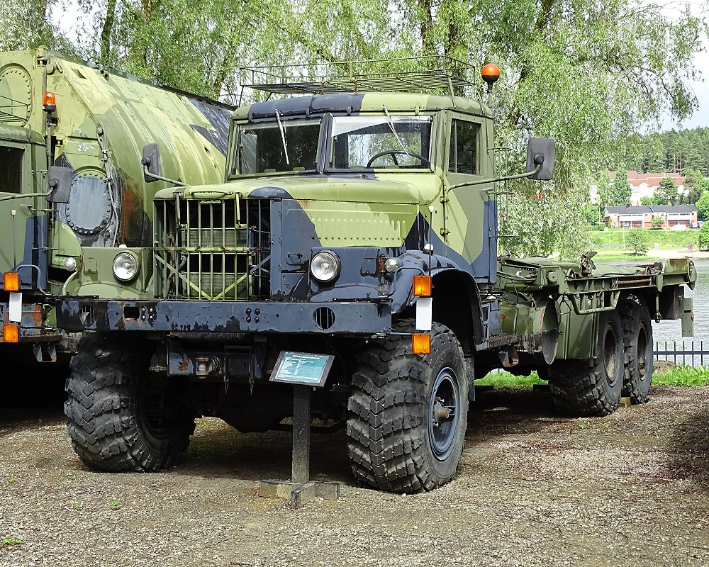 009 - KrAZ-255 PMP